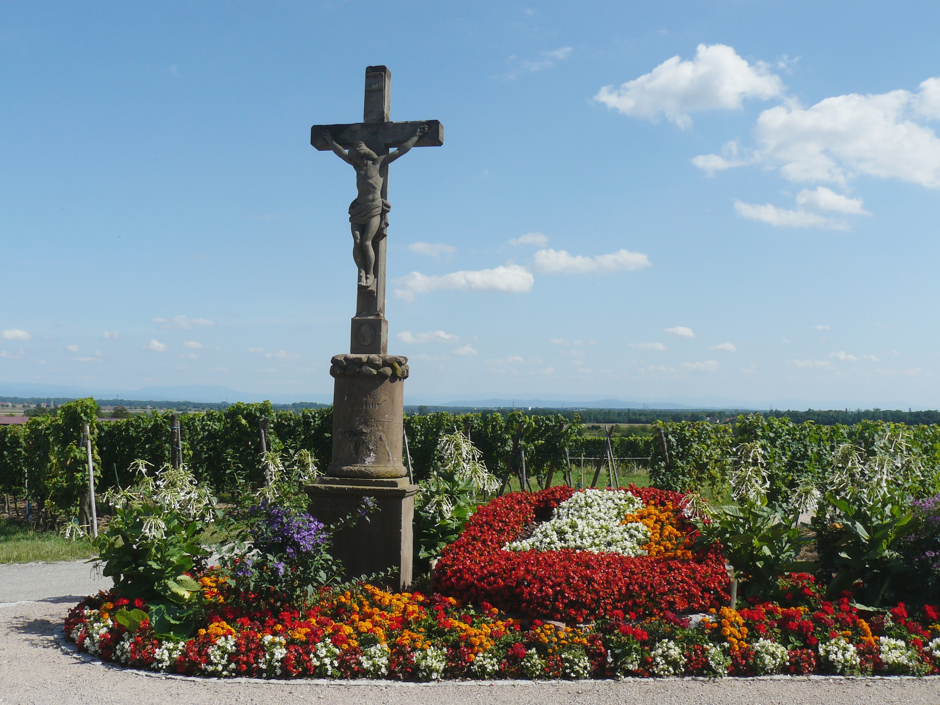 Calvaire à l'entrée de Dambach-la-Ville en venant de Diefenthal